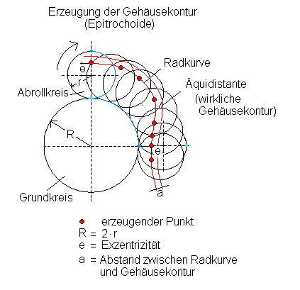 blauer Halbkreis raus